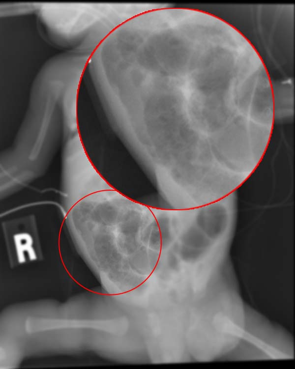 necrotizing enterocolitis